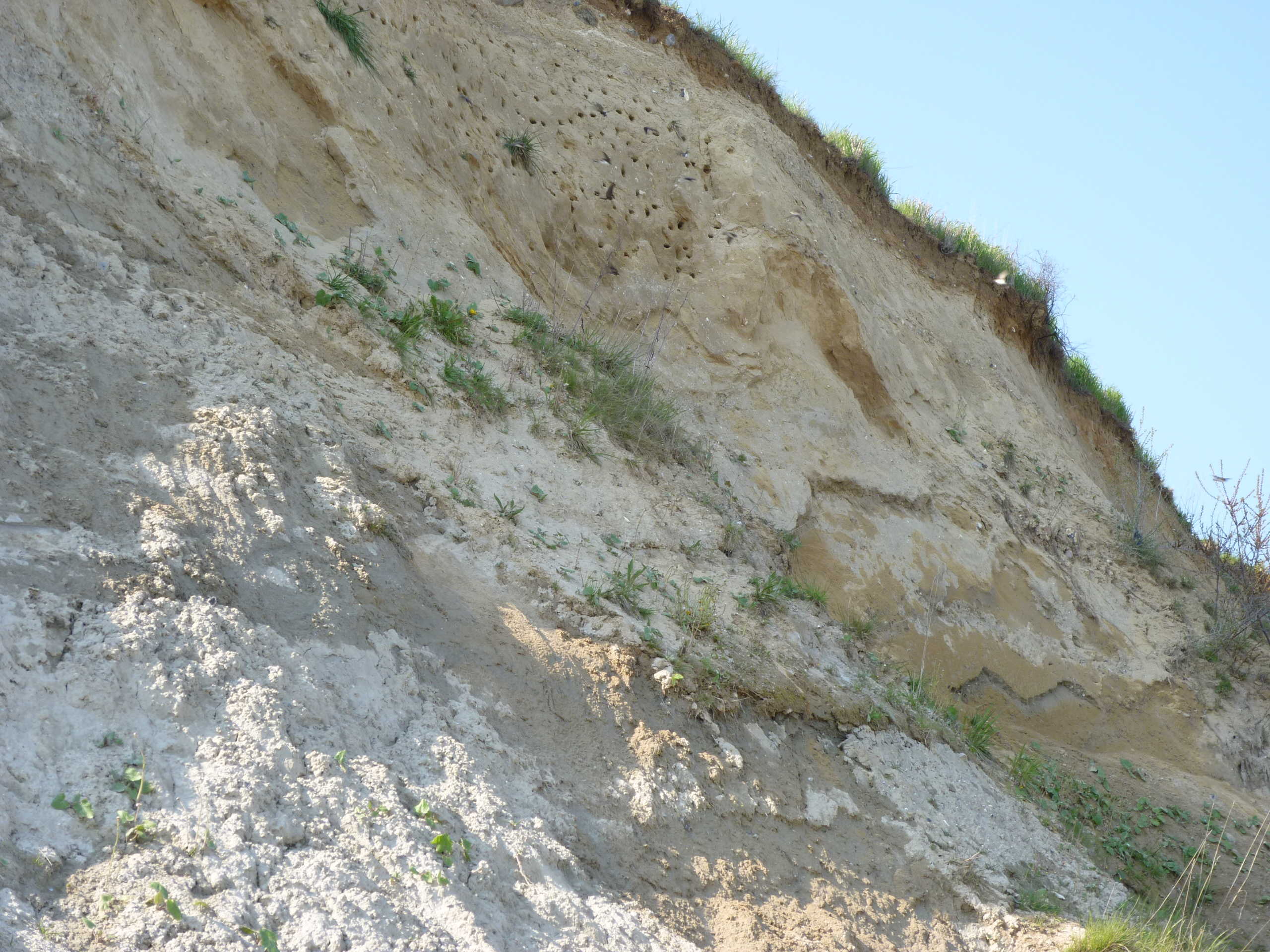 Brut-Höhlen der Seeschwalbe im naturbelassenen Steilufer zwischen Grömitz und Kullenhusen in Ostholstein. FFH-Gebiet mit der Nr. 1832-329.